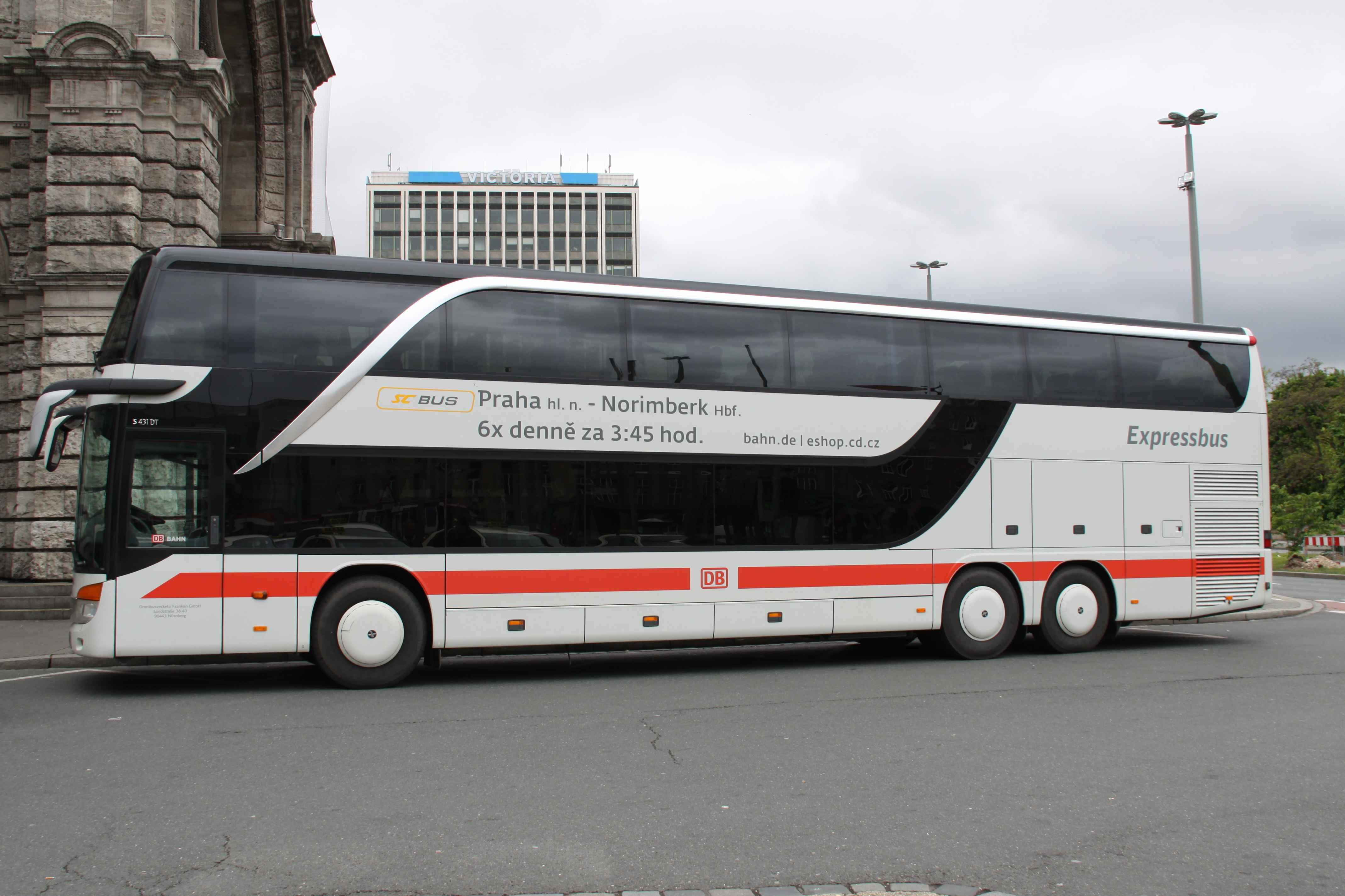 IC-Bus für die Verbindung Prag-Nürnberg